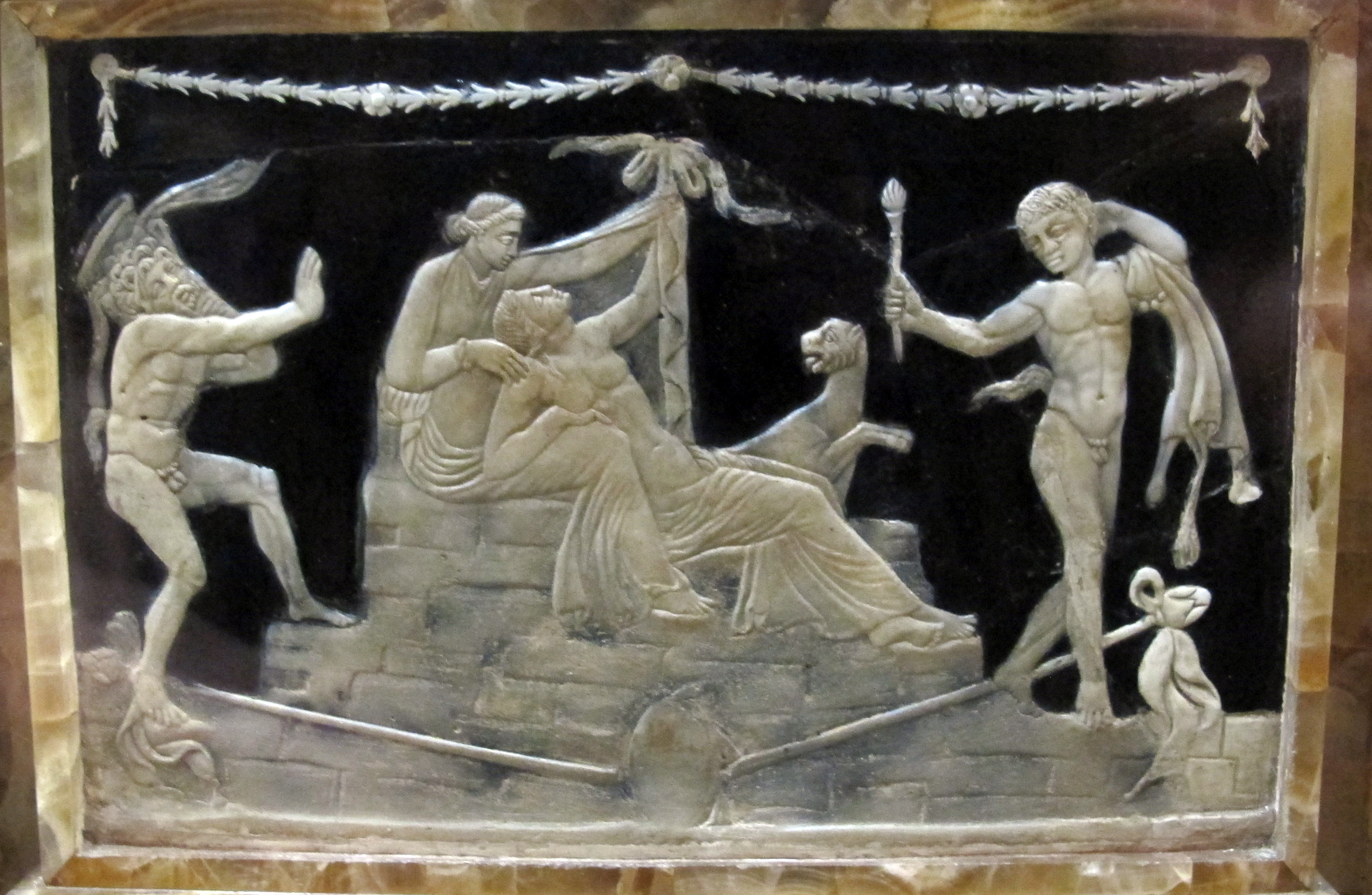 Sala delle Nozze Aldobrandini (Musei della biblioteca Apostolica Vaticana), esposizione temporanea (dicembre 2013) e collezione permanente